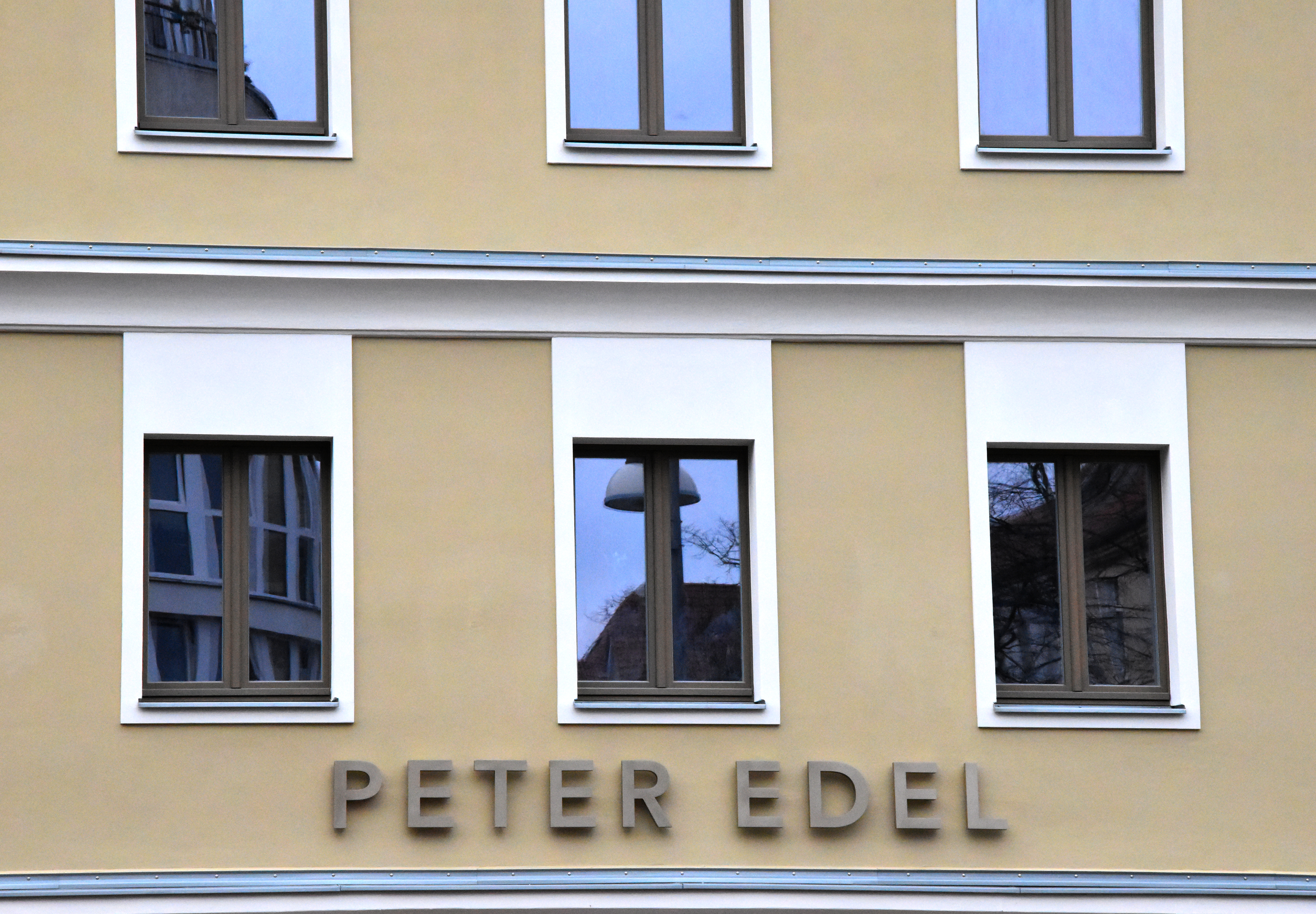 Berlin-Weißensee, Beschriftung an der Frontseite des Bildungs- und Kulturzentrums Peter Edel, ehemals Kreiskulturhaus Peter Edel.